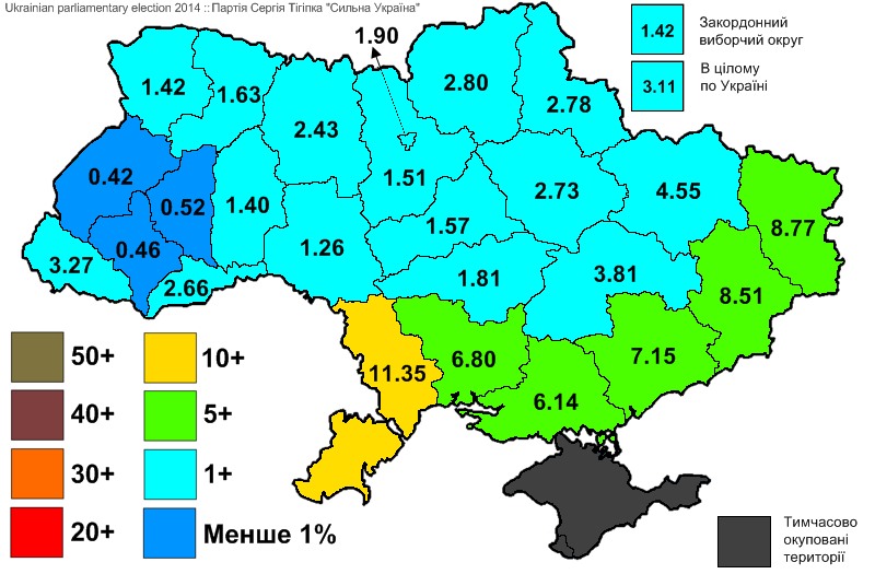 Результати виборів до Верховної Ради України, які відбулись 25 жовтня 2014 року. Інформація з офіційного сайту ЦВК. Партія Сергія Тігіпка "Сильна Україна".